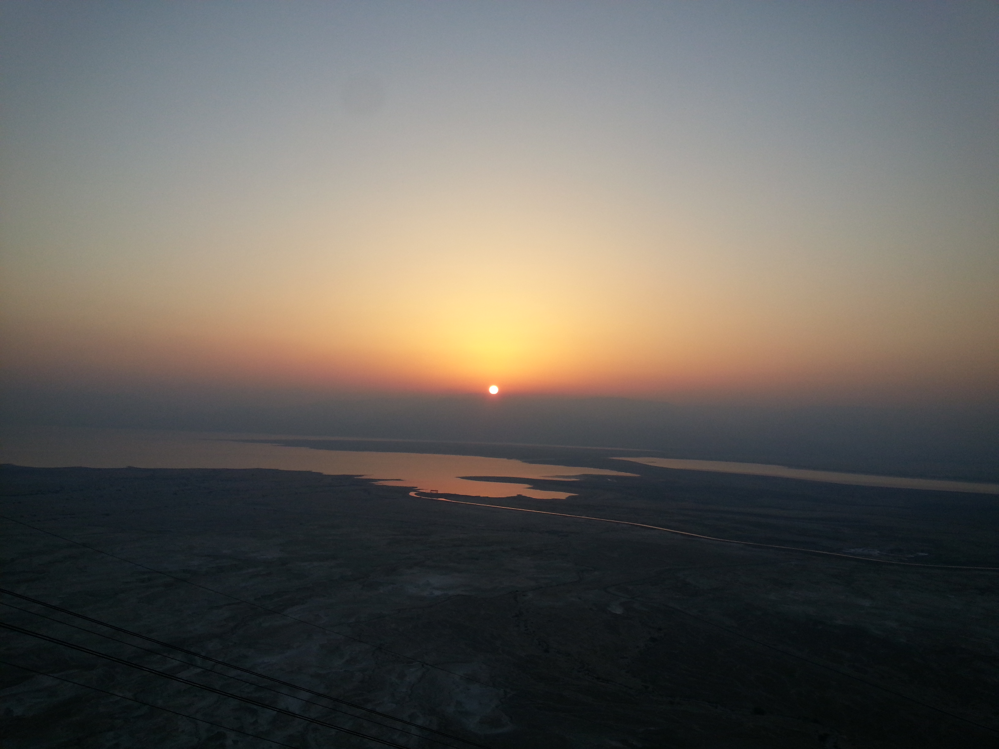 ים המלח- מבט ממצדה בזריחה